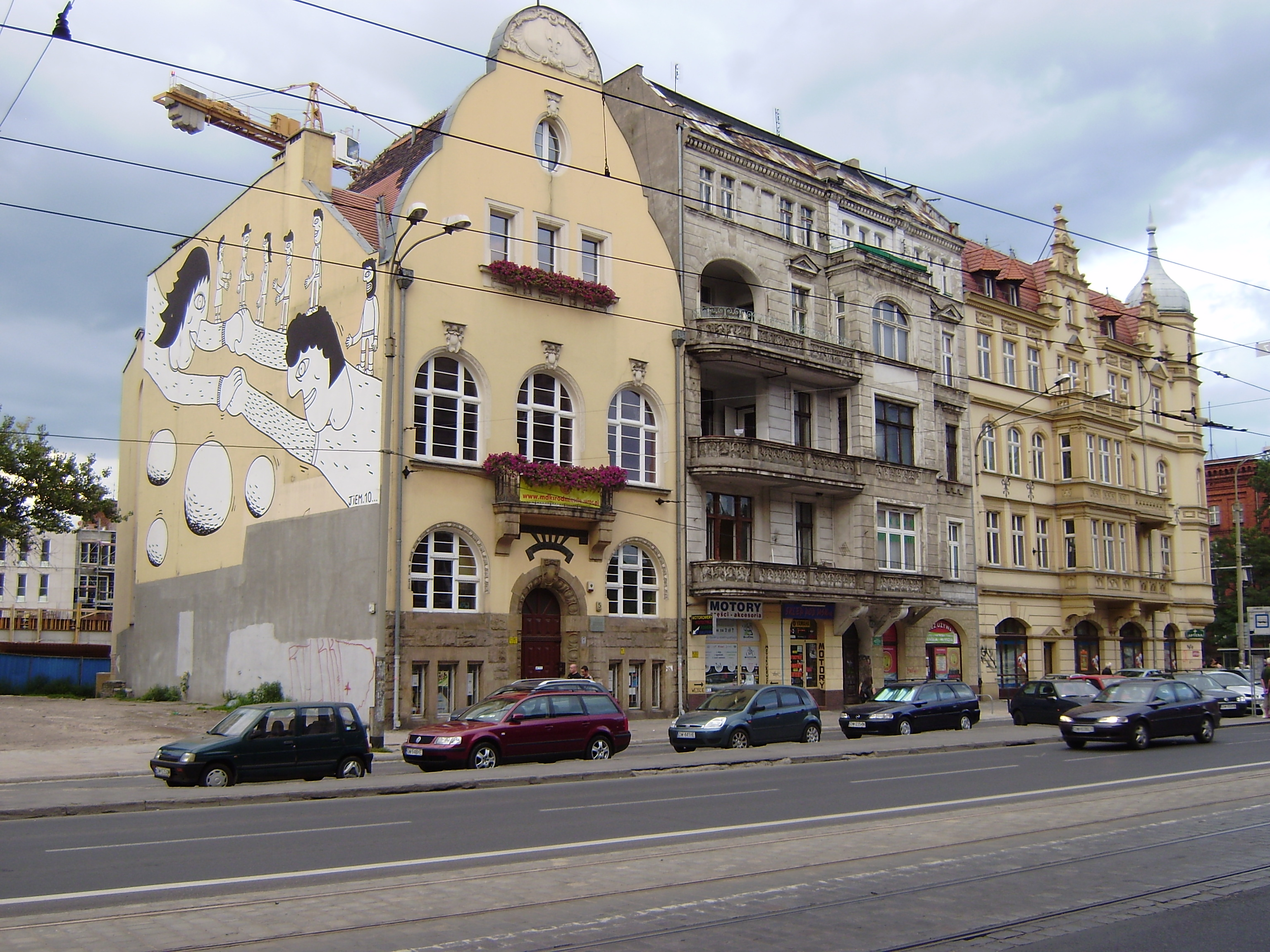 Ehemaliges Corpshaus der Lusatia Breslau